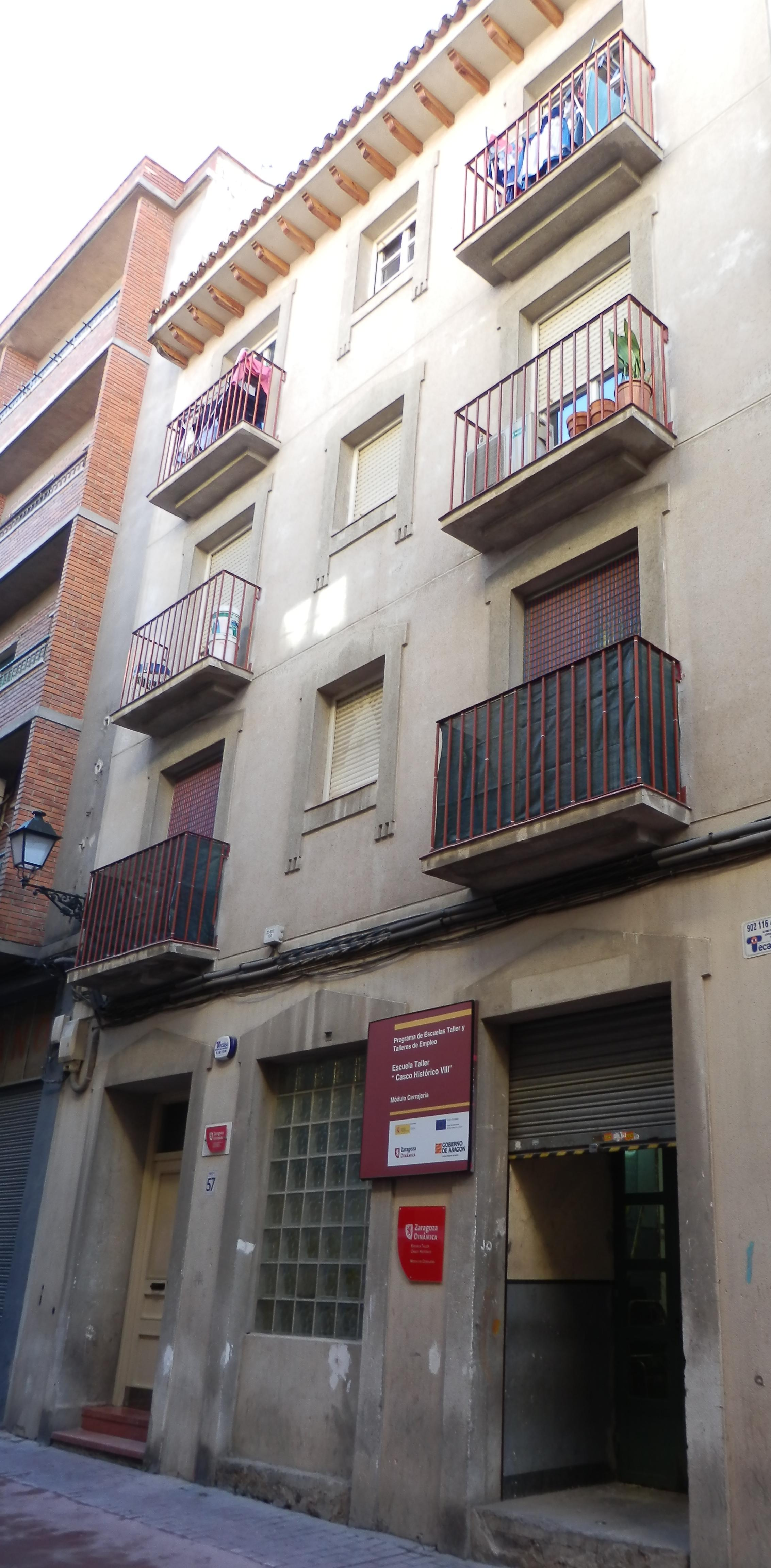 Edificio en la calle Ramón Pignatelli, 57, de Zaragoza. Construido en 1900 y rehabilitado en 1992. Amparo Poch vivió en este edificio porque así lo refleja el censo de 1910.